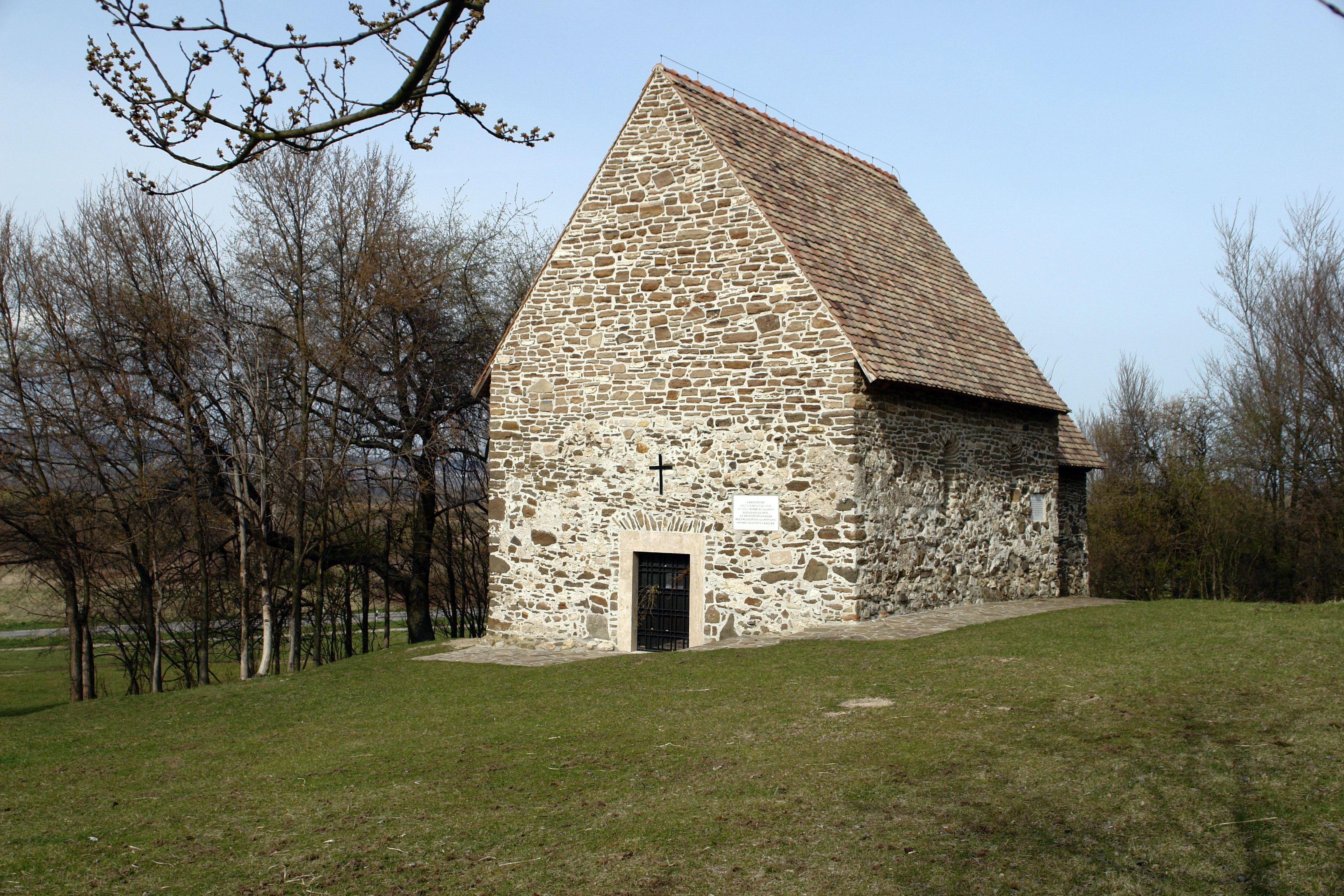 Templomrom, Tihany This is a photo of a monument in Hungary. Identifier: 10463